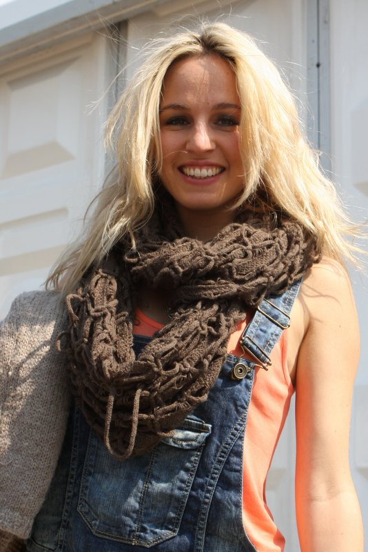 Nederlandse zangeres